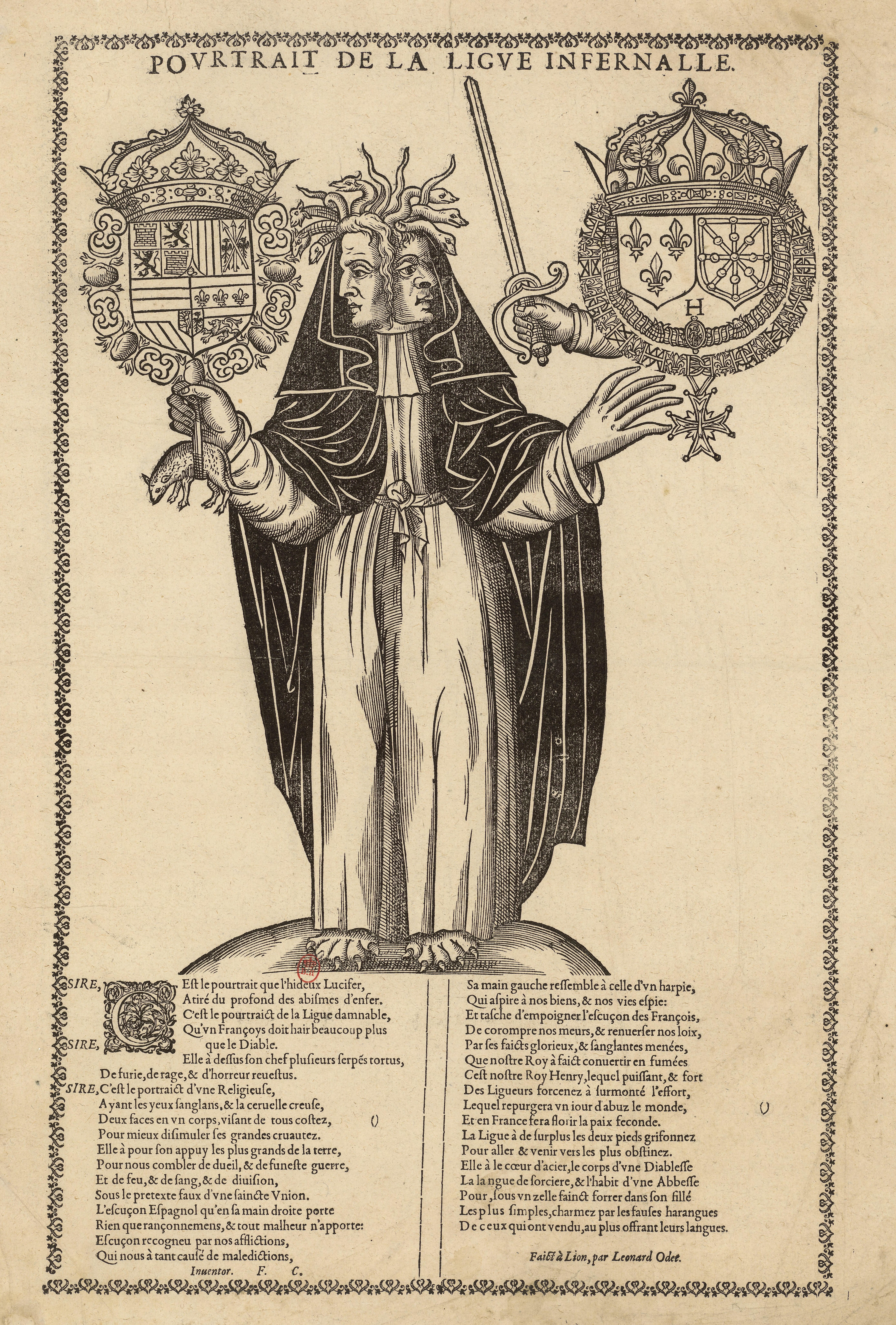 Portrait de la Ligue infernale. Gravure sur bois figurant dans Les belles Figures et Drolleries de la Ligue..., recueil de pamphlets compilés par Pierre de L'Estoile.